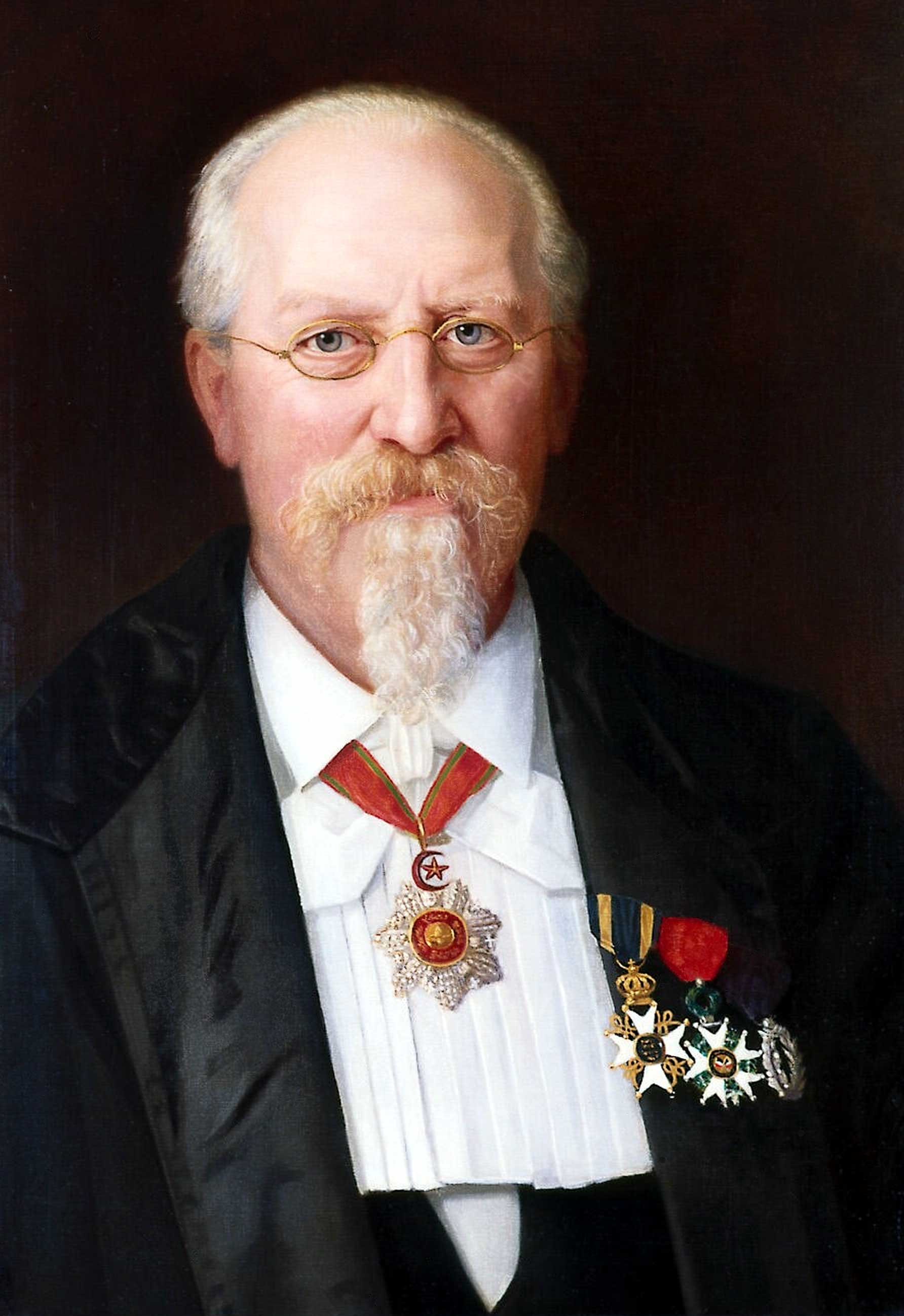 Gilles van Overbeek de Meijer (1831-1918), Dutch physician